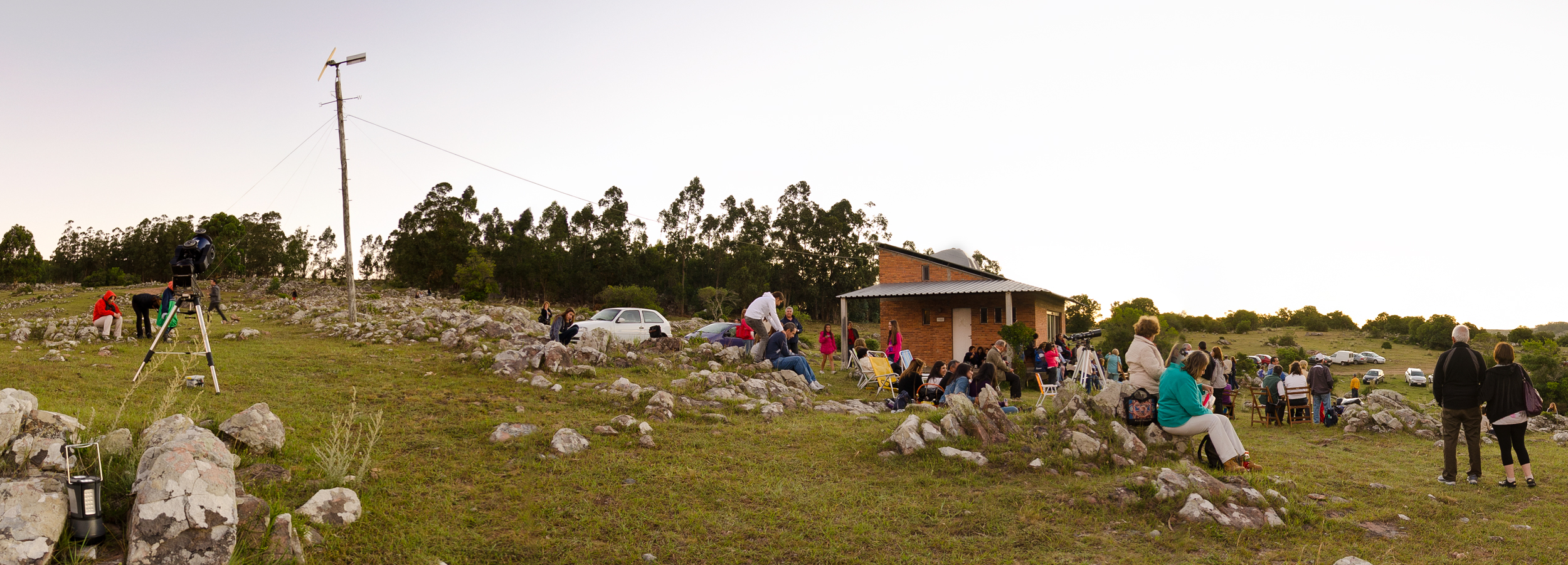 Foto tomada el día del astrónomo amateur, en el Observatorio Eta Carinae, actividad organizada por la Fundación Astronómica Uruguay.